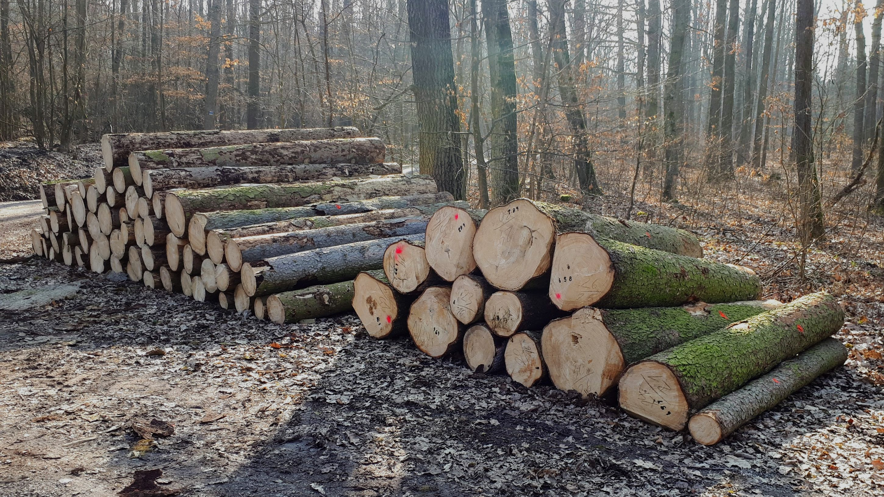 Metrová pole složená v lese